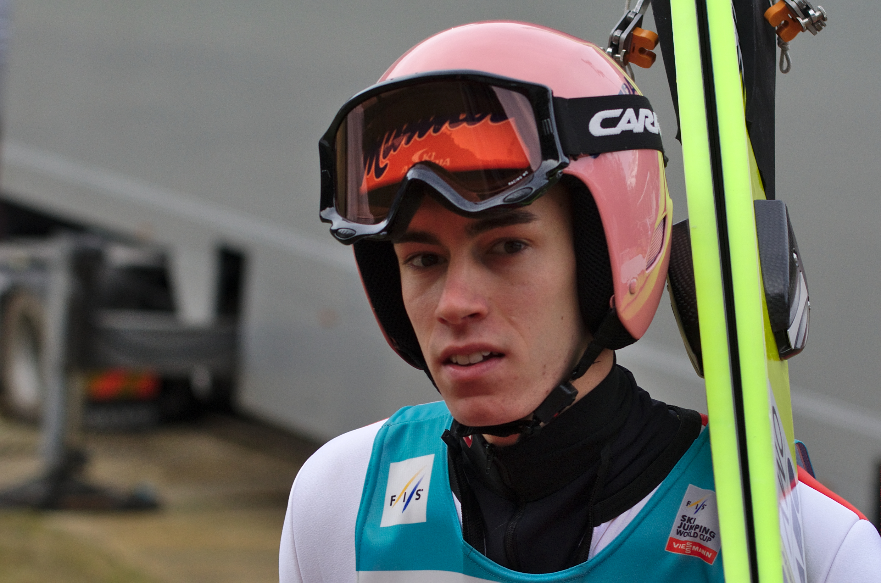 FIS Ski Jumping World Cup 2014 - Engelberg - 20141221 - Stefan Kraft